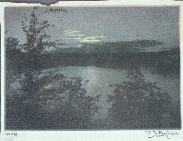 Vladimír Jindřich Bufka, Bez názvu (Krajina) 1908. Vedle portrétní tvorby zaujímají v Bufkově díle nejdůležitější místo právě krajinářské motivy. Zvláště pozoruhodná jsou jeho nokturna, považovaná za jeho specialitu...